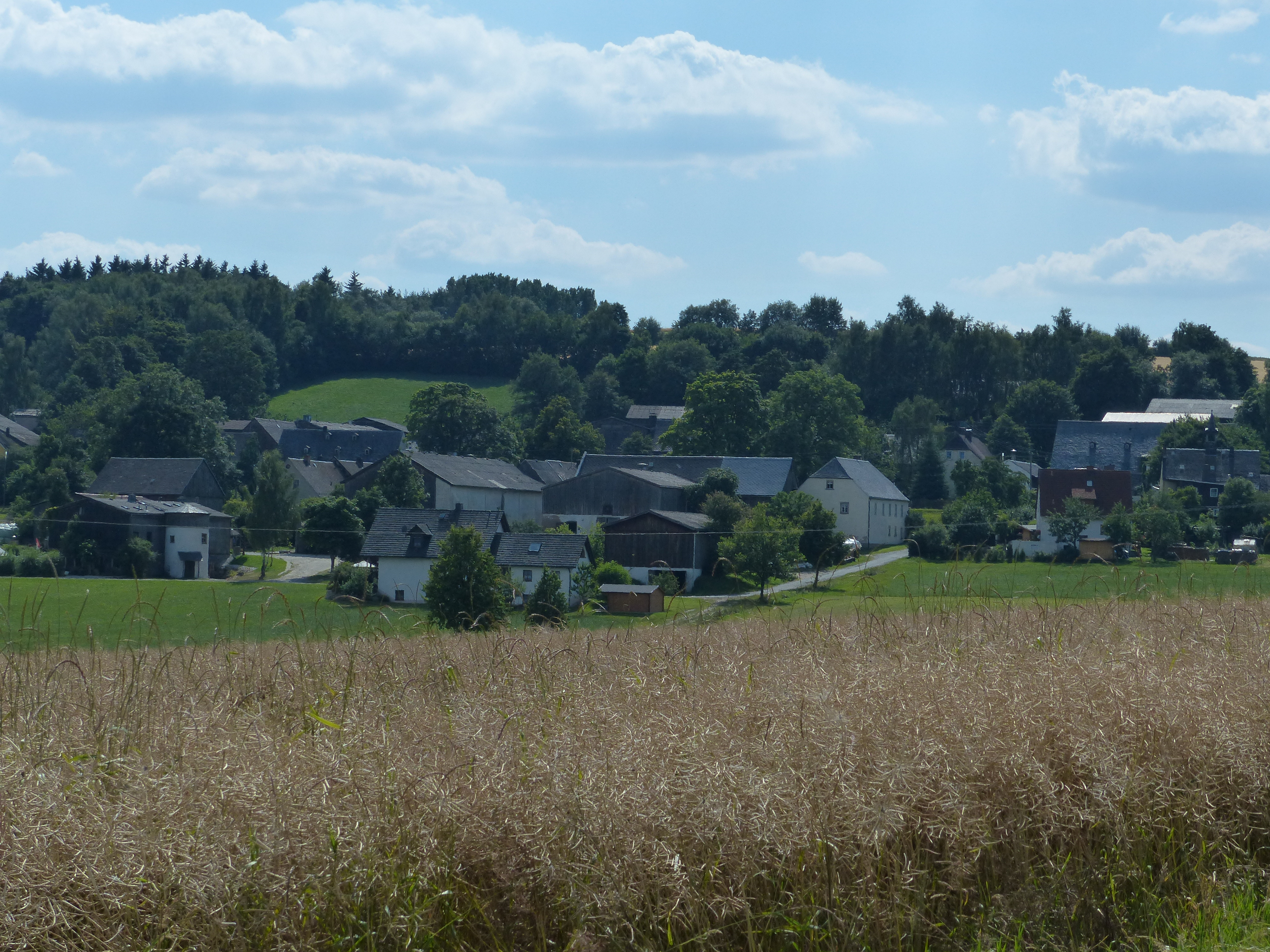 Bauwerk im Stadtgebiet von Weißenstadt